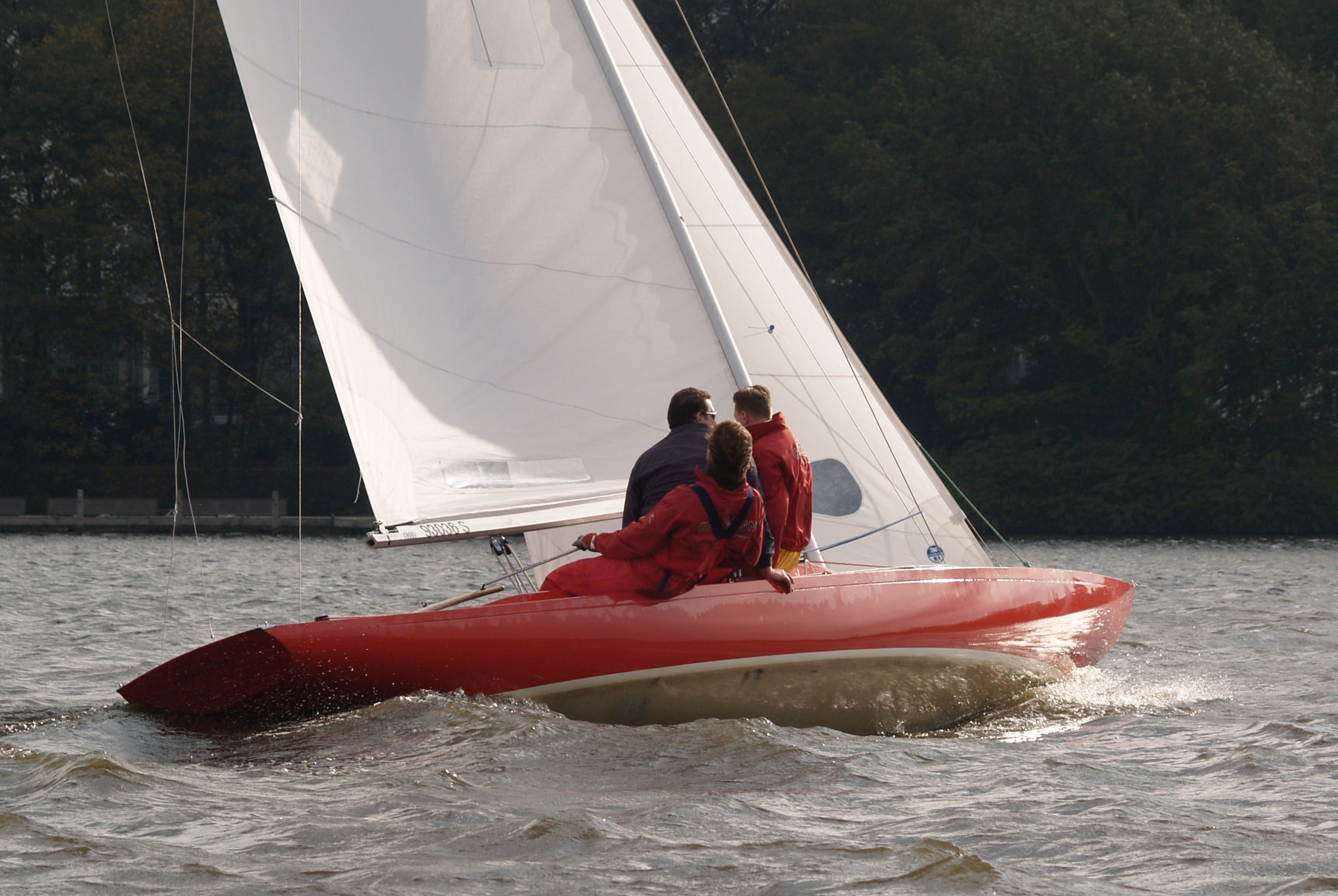 Drachen